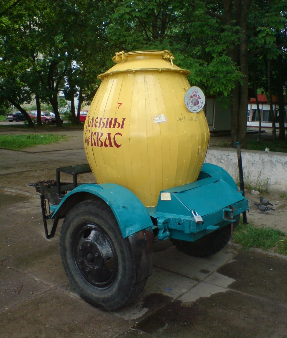 Квасная бочка в Могилёве